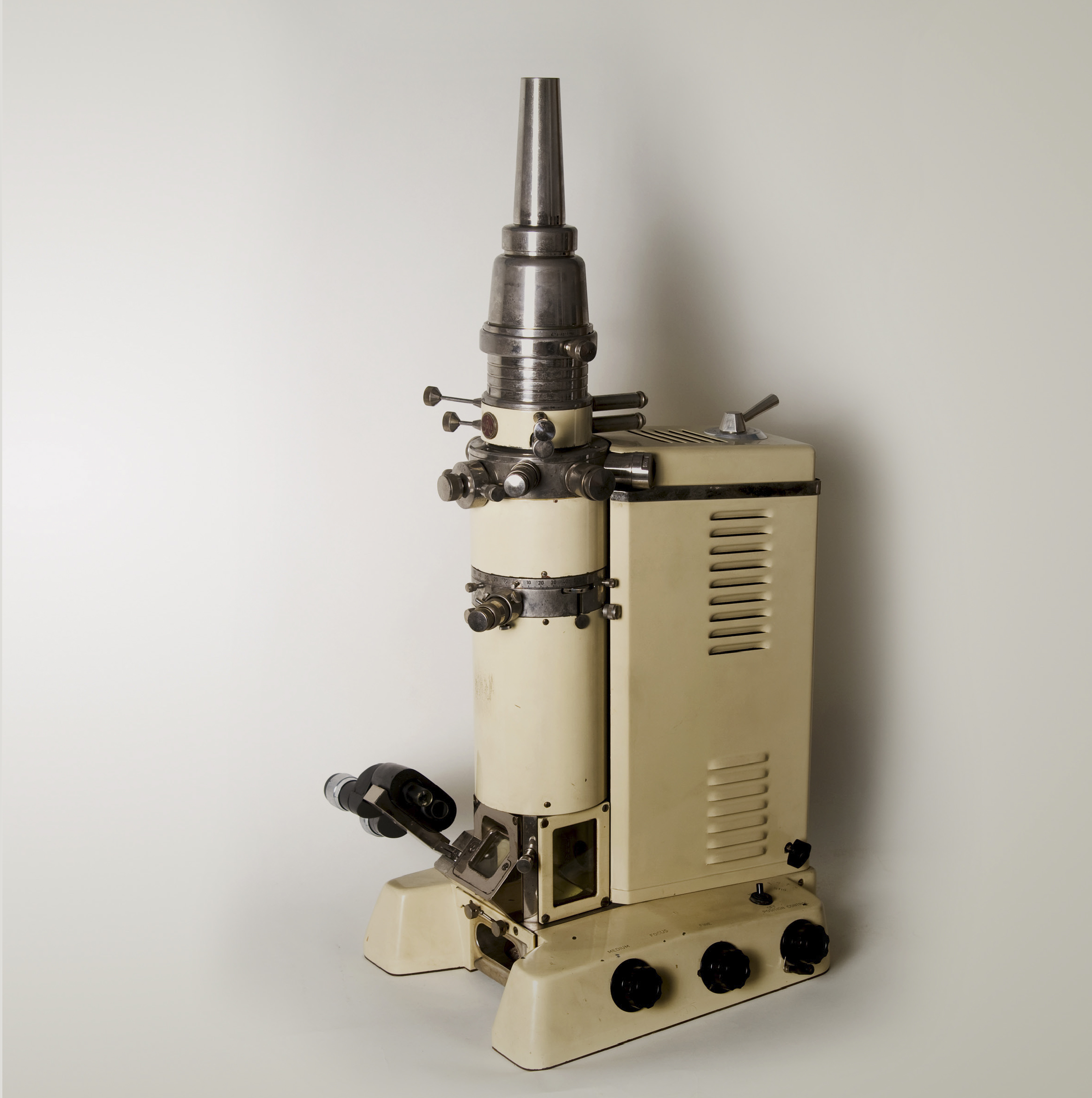 Microscopio electrónico de 1960, Museo Nacional de Ciencia y Tecnología